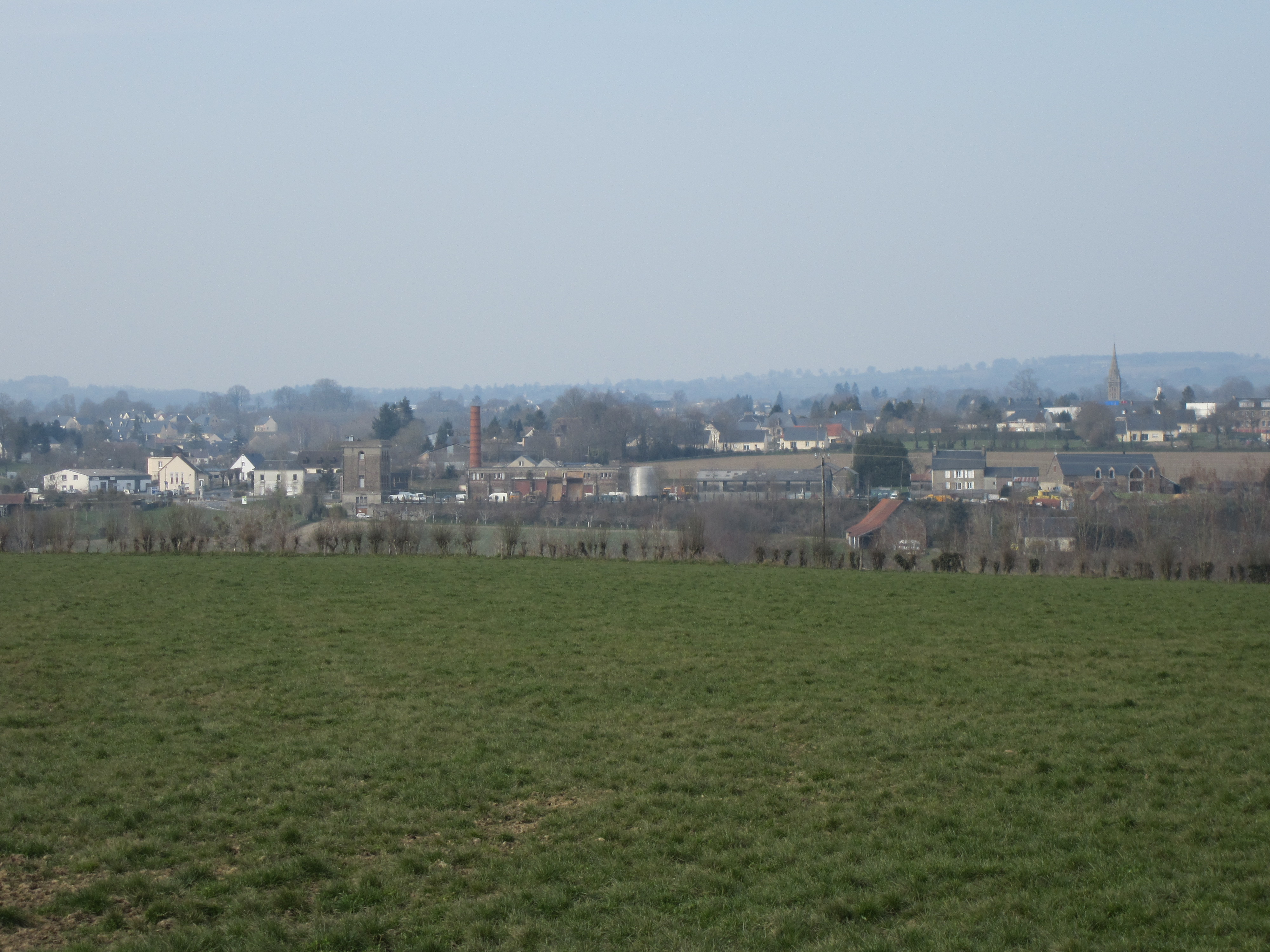 Panorama sur Brécey depuis le chateau de Vassy